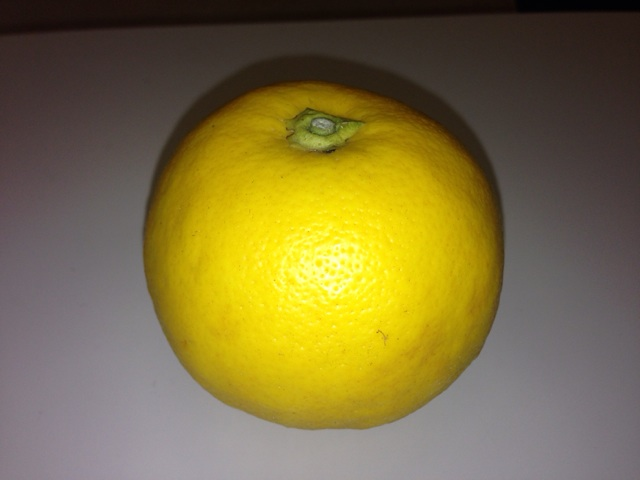 citrus_yuukou